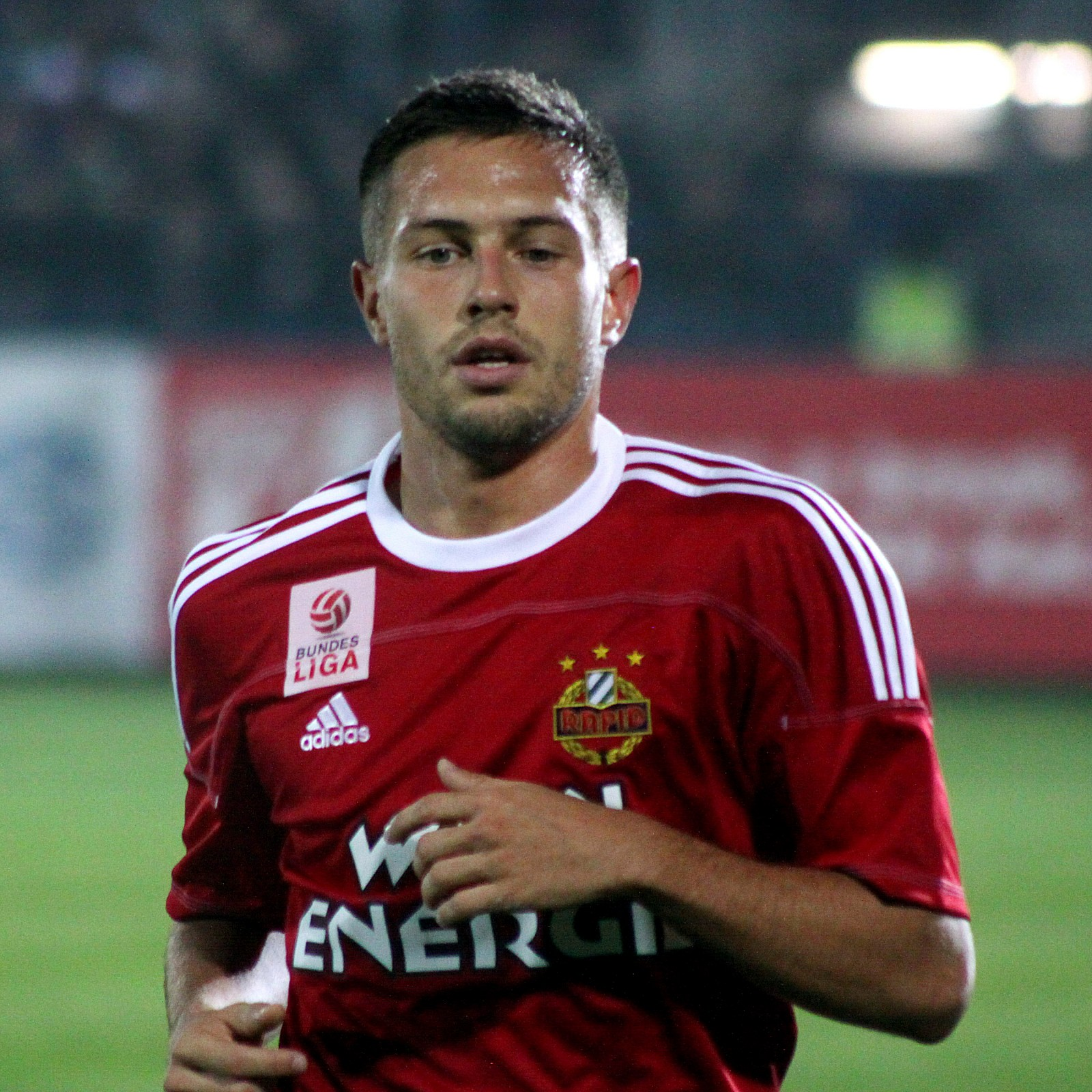 Meisterschaftsspiel der österreichischen Bundesliga: SC Wiener Neustadt gegen SK Rapid Wien (0:0) am 6. Oktober 2013 im Wiener Neustädter Stadion. - Das Foto zeigt Thomas Schrammel (SK Rapid Wien).